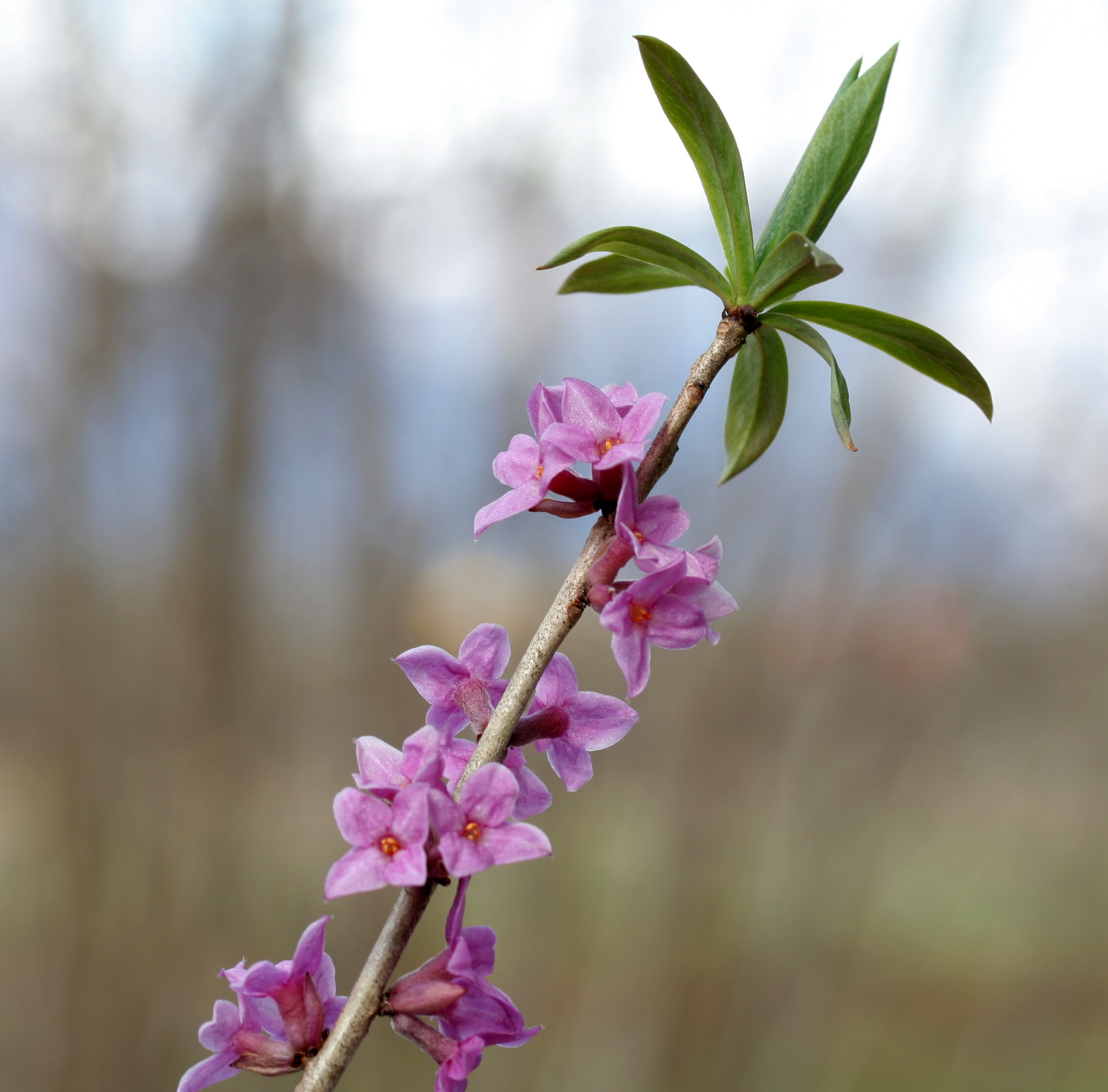 Daphne_mezereum (Dafne mezereo) Località : Pasa, Sedico (BL), 356 m s.l.m.